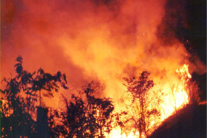 Ação do fogo em vegetação inicia processo de sucessão ecológica secundária